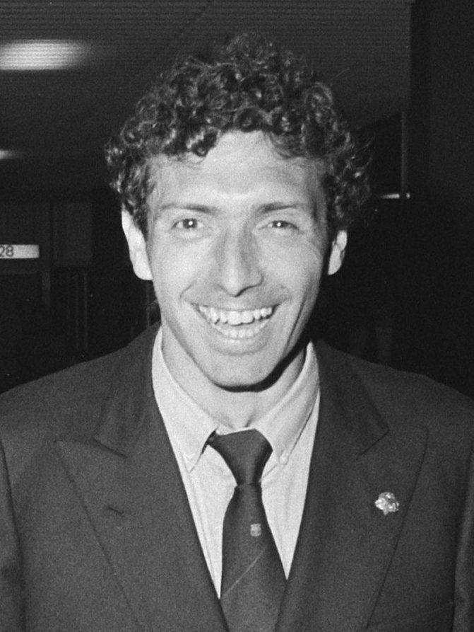 Collectie / Archief : Fotocollectie Anefo Reportage / Serie : Aankomst FC Barcelona op Schiphol in verband met wedstrijd tegen NEC Beschrijving : Trainer Menotti (l) en sterspeler Quini (Enrique Castro González) Datum : 17 oktober 1983 Locatie : Noord-Holland, Schiphol Trefwoorden : aankomst en vertrek, trainers, voetballers Persoonsnaam : Castro, Enrique, Menotti, Cesar Fotograaf : Bogaerts, Rob / Anefo Auteursrechthebbende : Nationaal Archief Materiaalsoort : Negatief (zwart/wit) Nummer archiefinventaris : bekijk toegang 2.24.01.05 Bestanddeelnummer : 932-7345